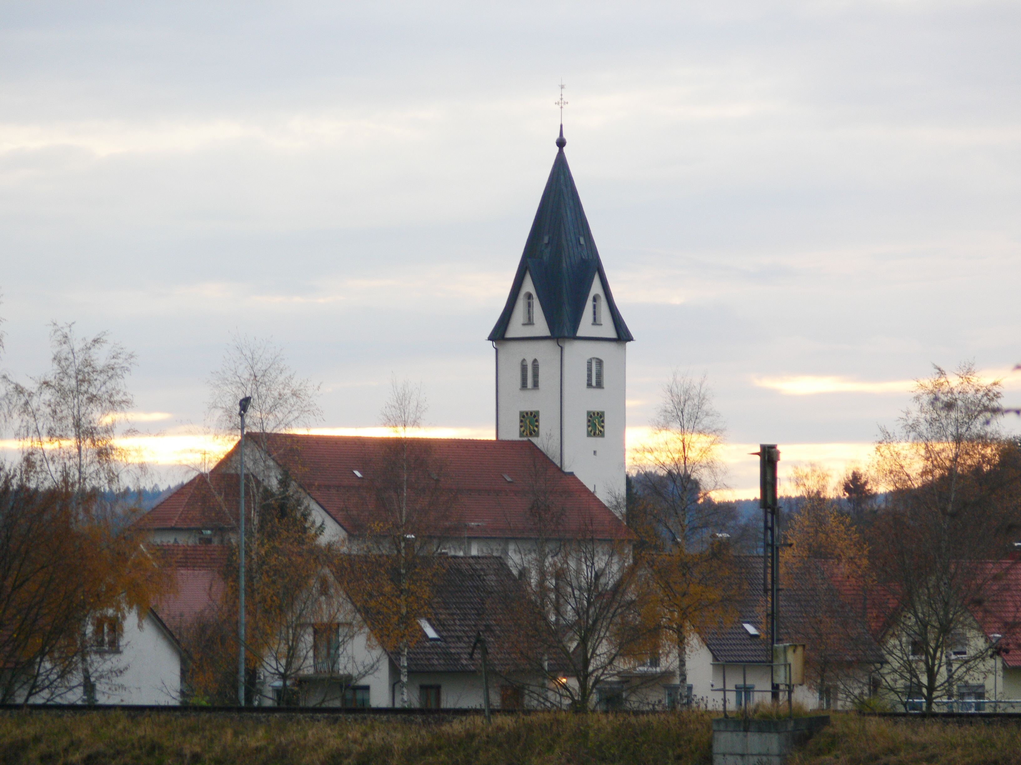 Pfarrkirche St. Michael, Aichstetten, Landkreis Ravensburg, Baden-Württemberg